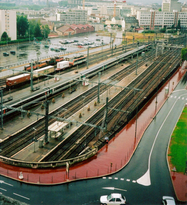 Vue du Campanile de Limoges Bénédictins